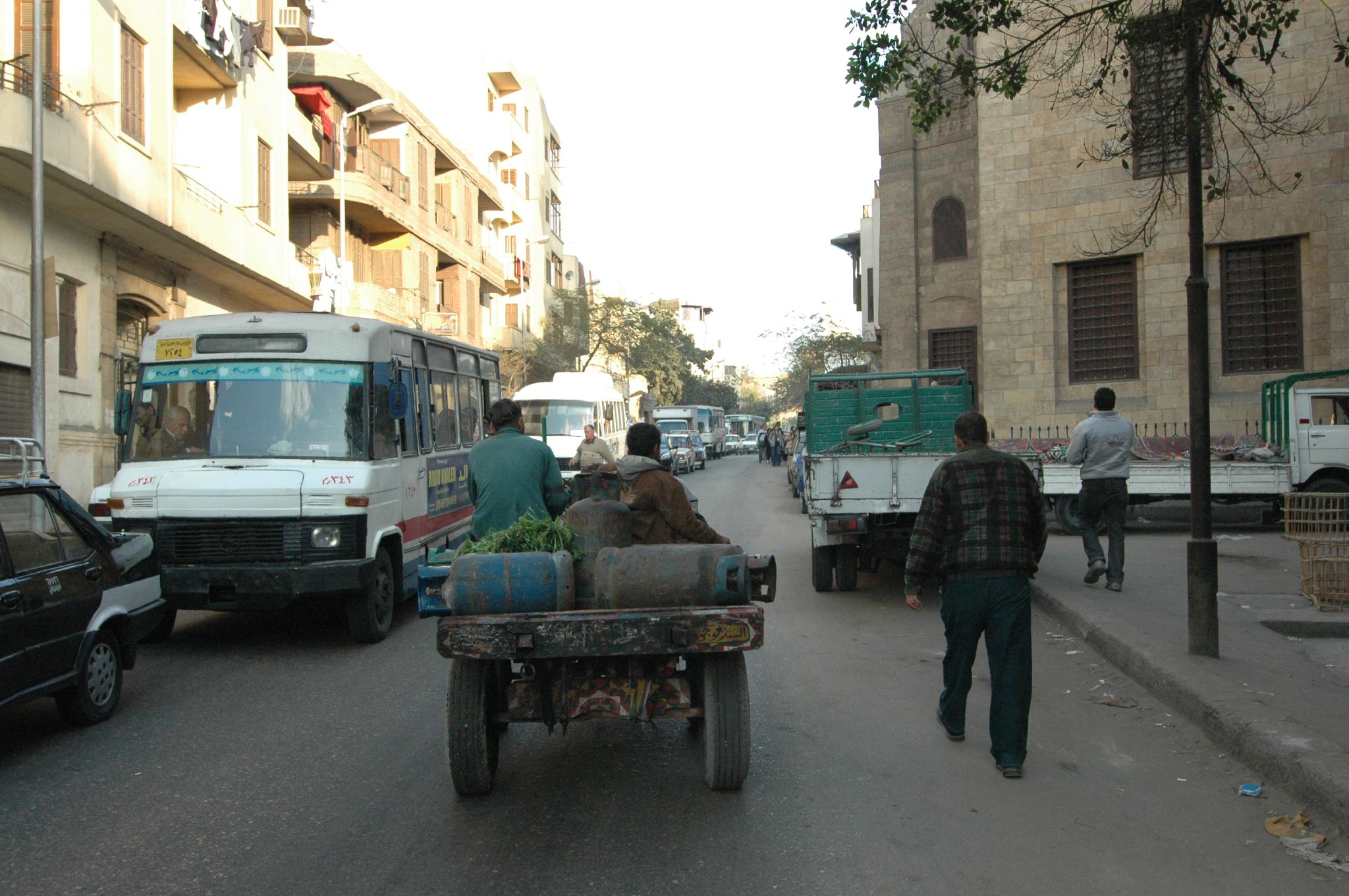 Cairo: carretto con bombole